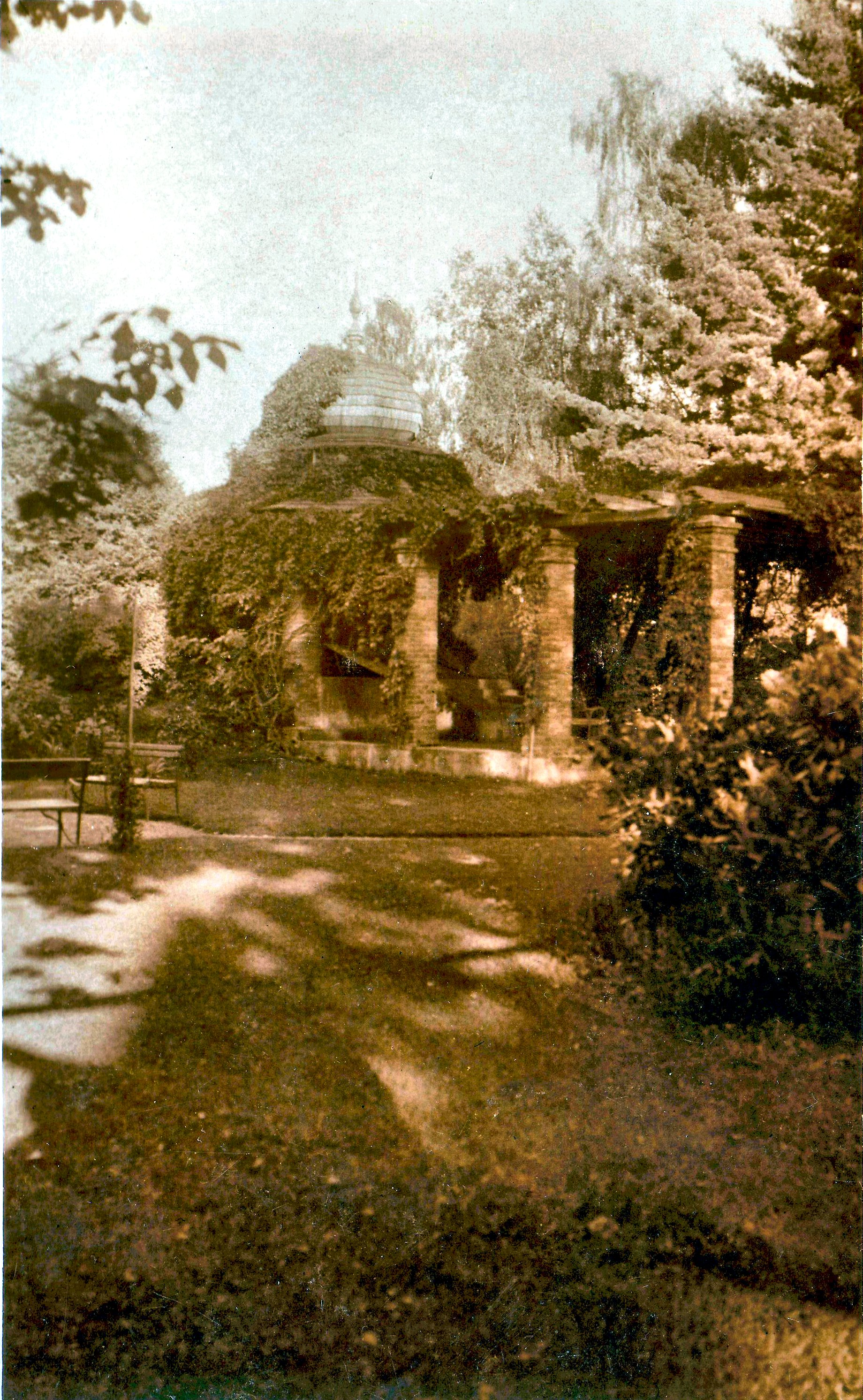 Foto vom Schlosspark Berhometh nach 1900, koloriert, Schloss der Freiherren, später Grafen Wassilko von Serecki